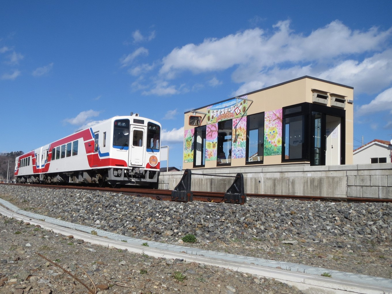 復旧直後の鵜住居駅 Canon IXY 3